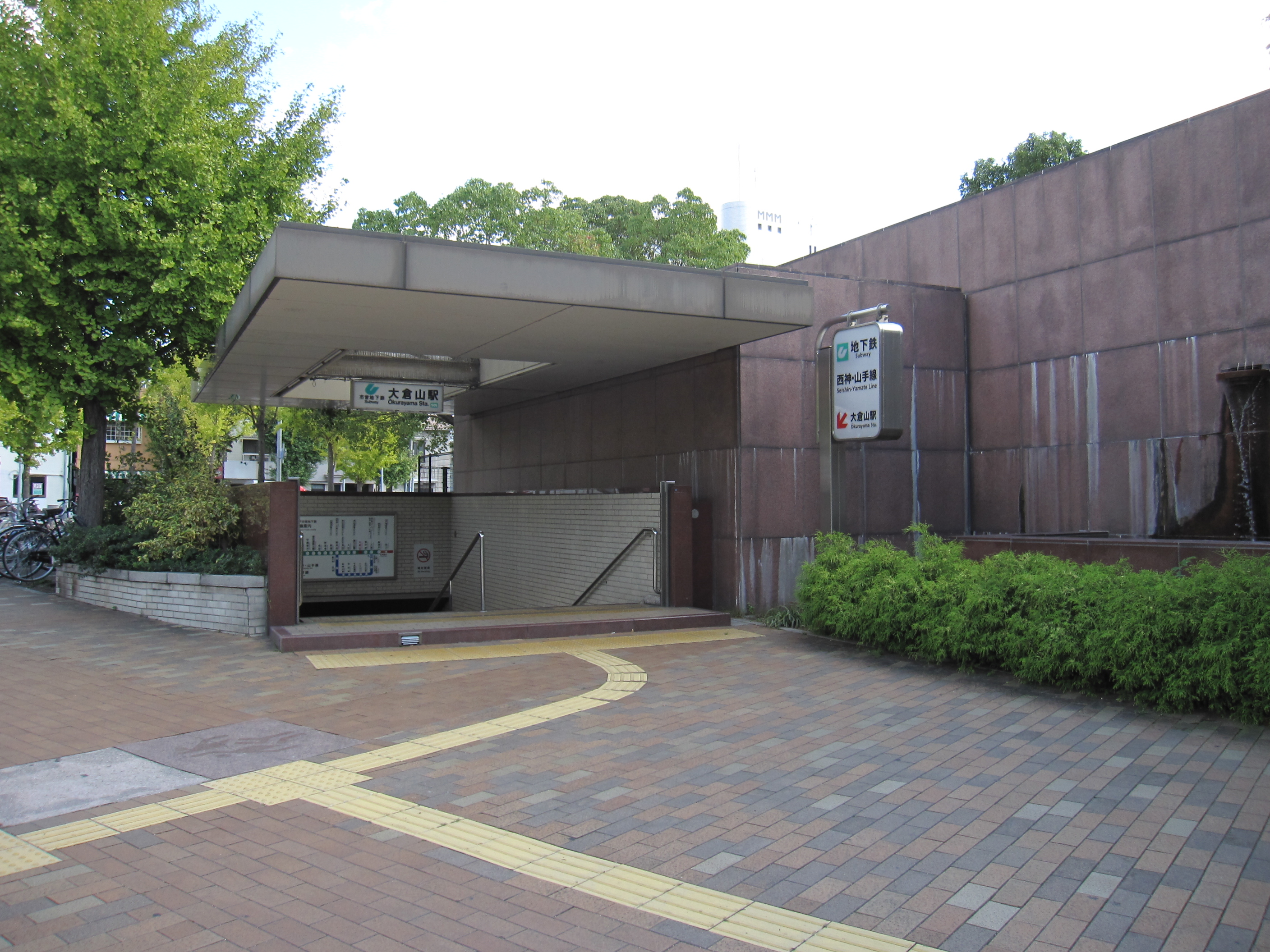 神戸市営地下鉄大倉山駅